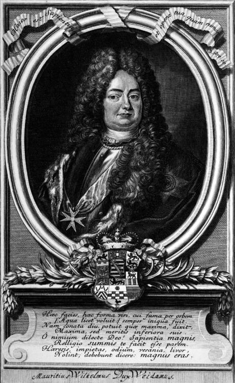 Herzog Moritz Wilhelm von Sachsen-Zeit (1664-1718)